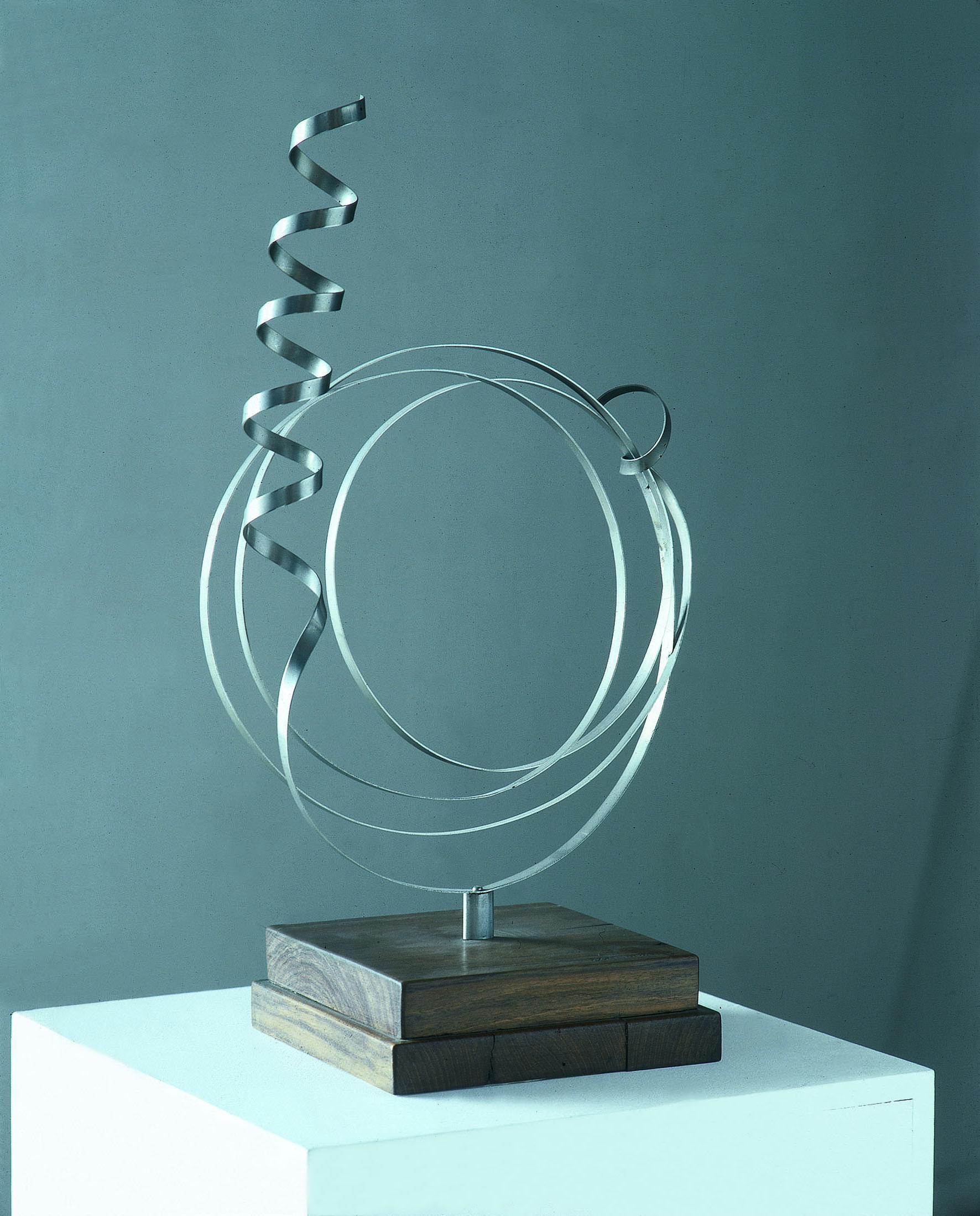 MAMLL 1967a